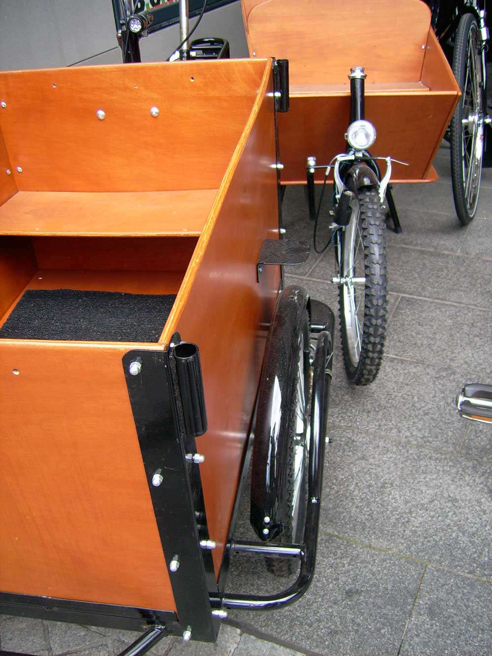 eigenes Foto, aufgenommen 2006 in Cuxhaven